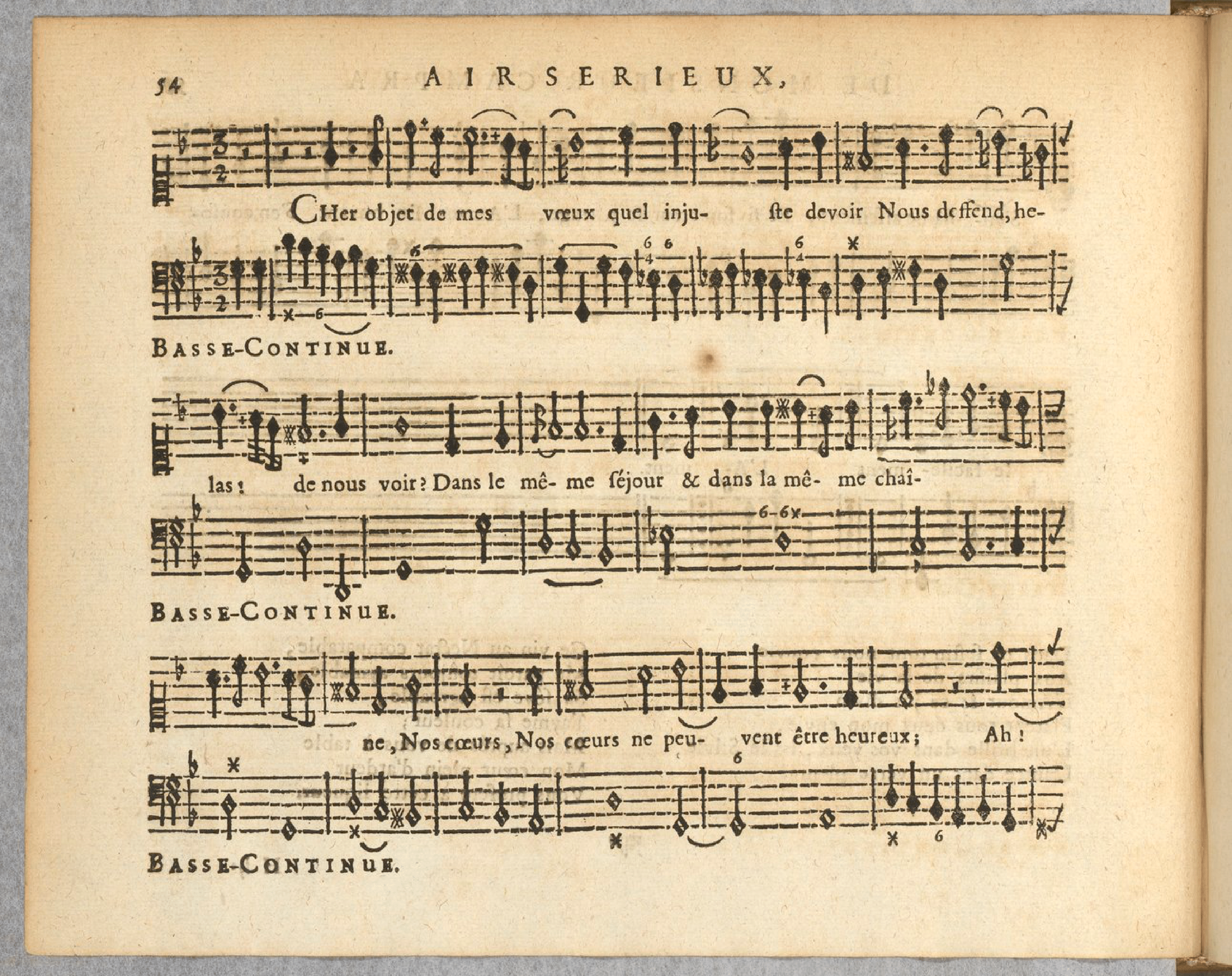 "Cher Objet de mes vœux" est publié en mars 1701 dans le Recueil d'airs sérieux et à boire de différents auteurs pour l'année 1701 chez Ballard.